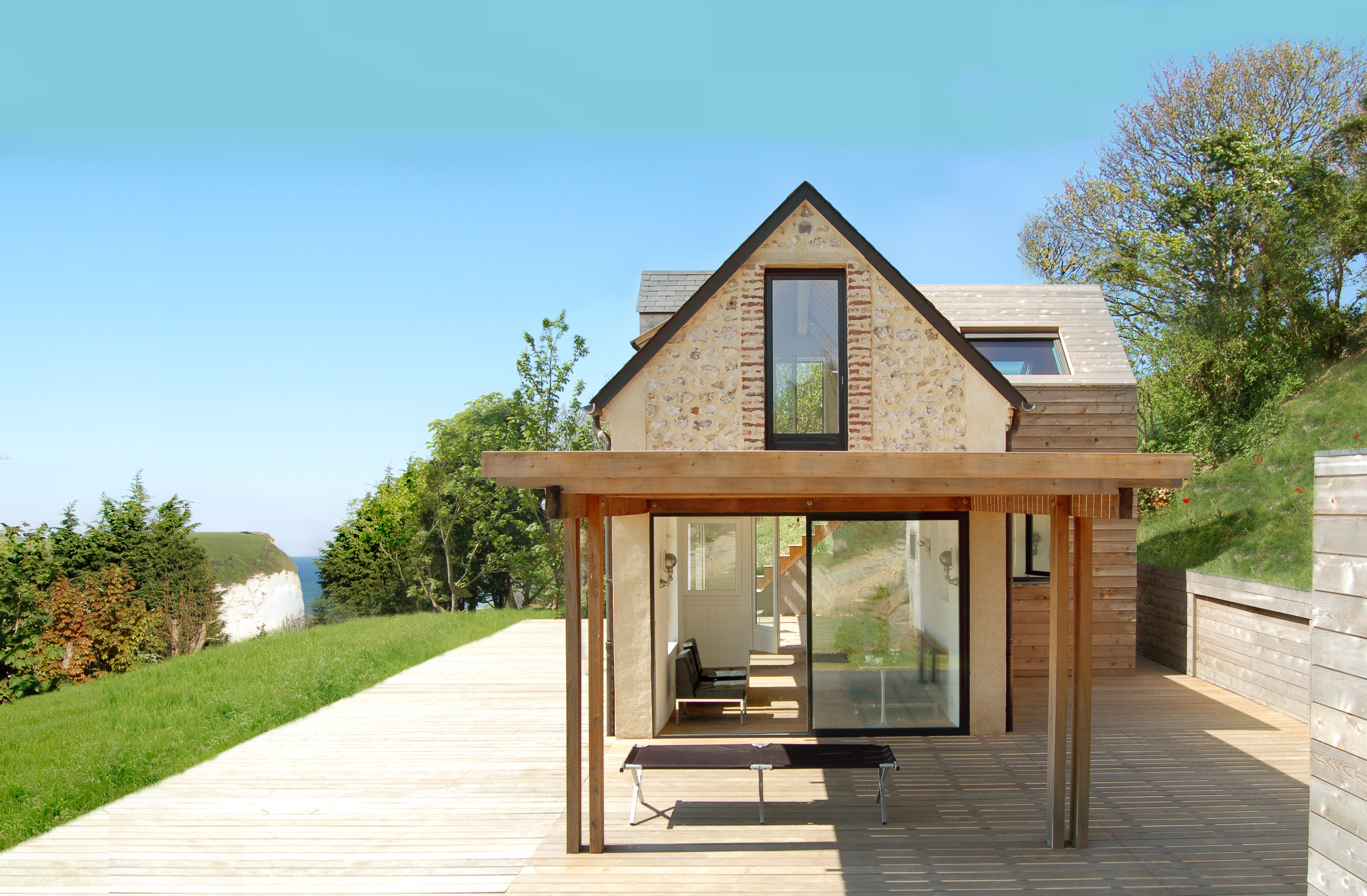 Maison construite par FAA près d'Etretat